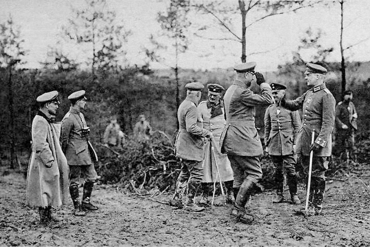 Kronprinz Georg von Sachsen im Felde 1916 (Feldpostkarte No. 114 mit einer Aufnahme von Oskar Bohr)